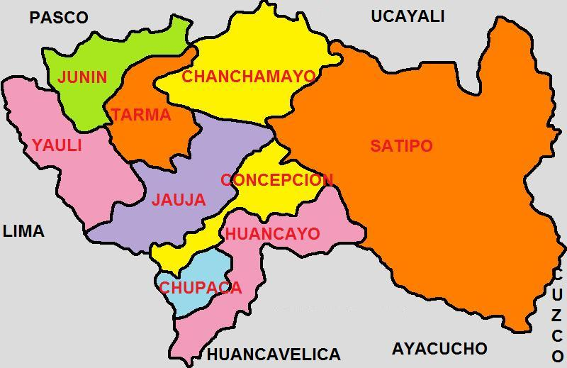 Imagen que muestra la División Politica del Departamento de Junin, una de las 25 circunscripciones en que se divide el Perú